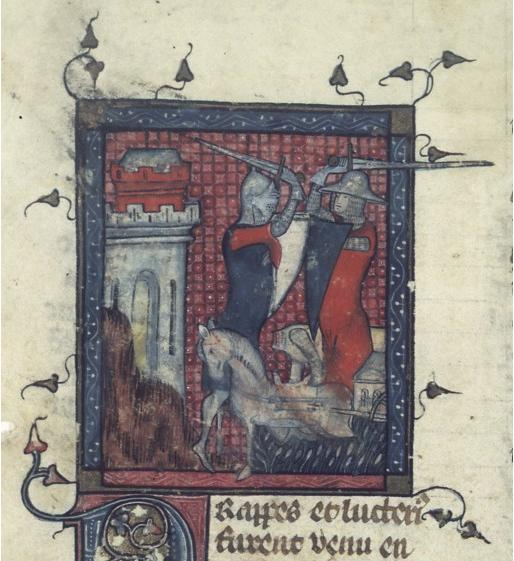 siège d'Uxellodunum enluminure médiévale origine BNF